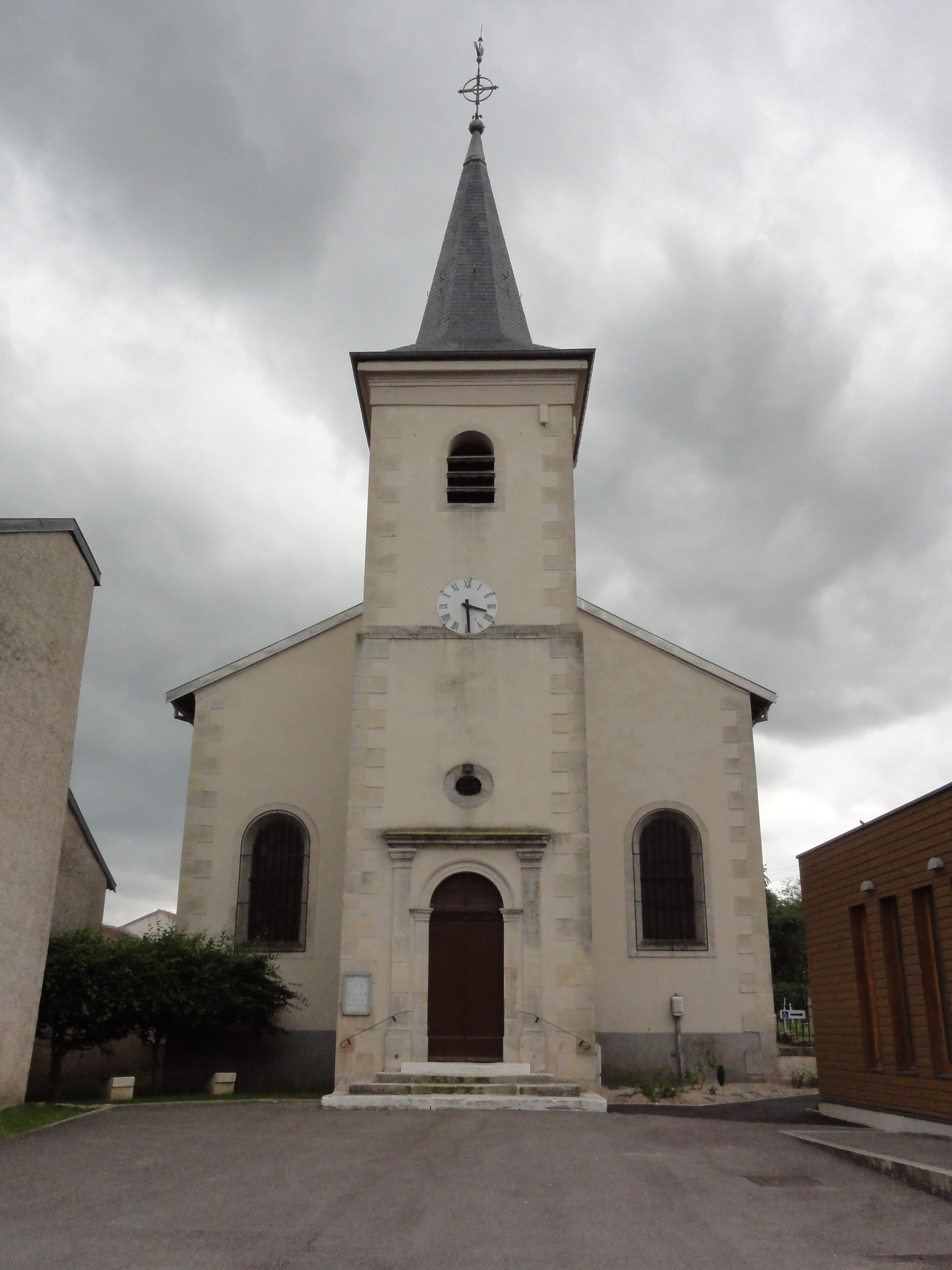 Vélaine-sous-Amance (M-et-M) église